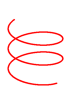 helix zelf gemaakt, Maple 9.5